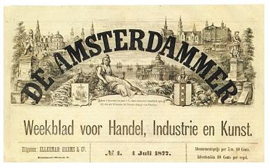 Kop van het weekblad De Amsterdammer uit 1877 Digitaal gerestaureerd.